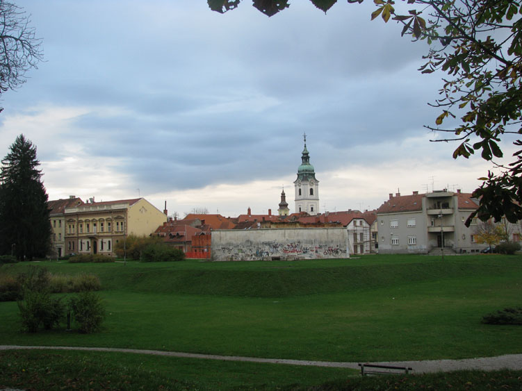 Pogled prema karlovačkoj Zvijezdi, starom središtu grada Karlovca